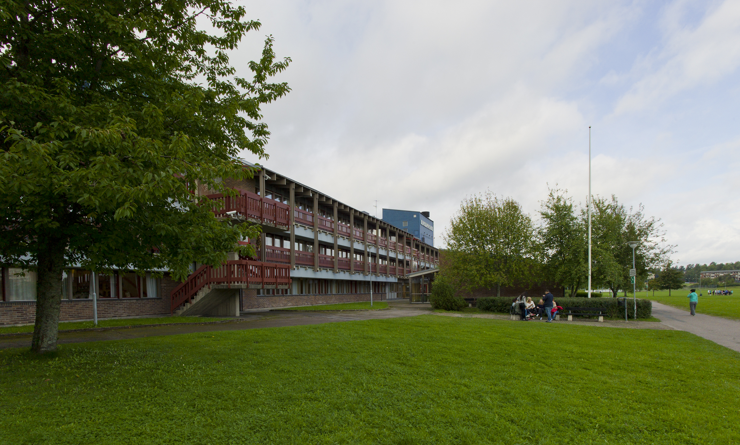 Arlandagymnasiet (Kunskapens hus)